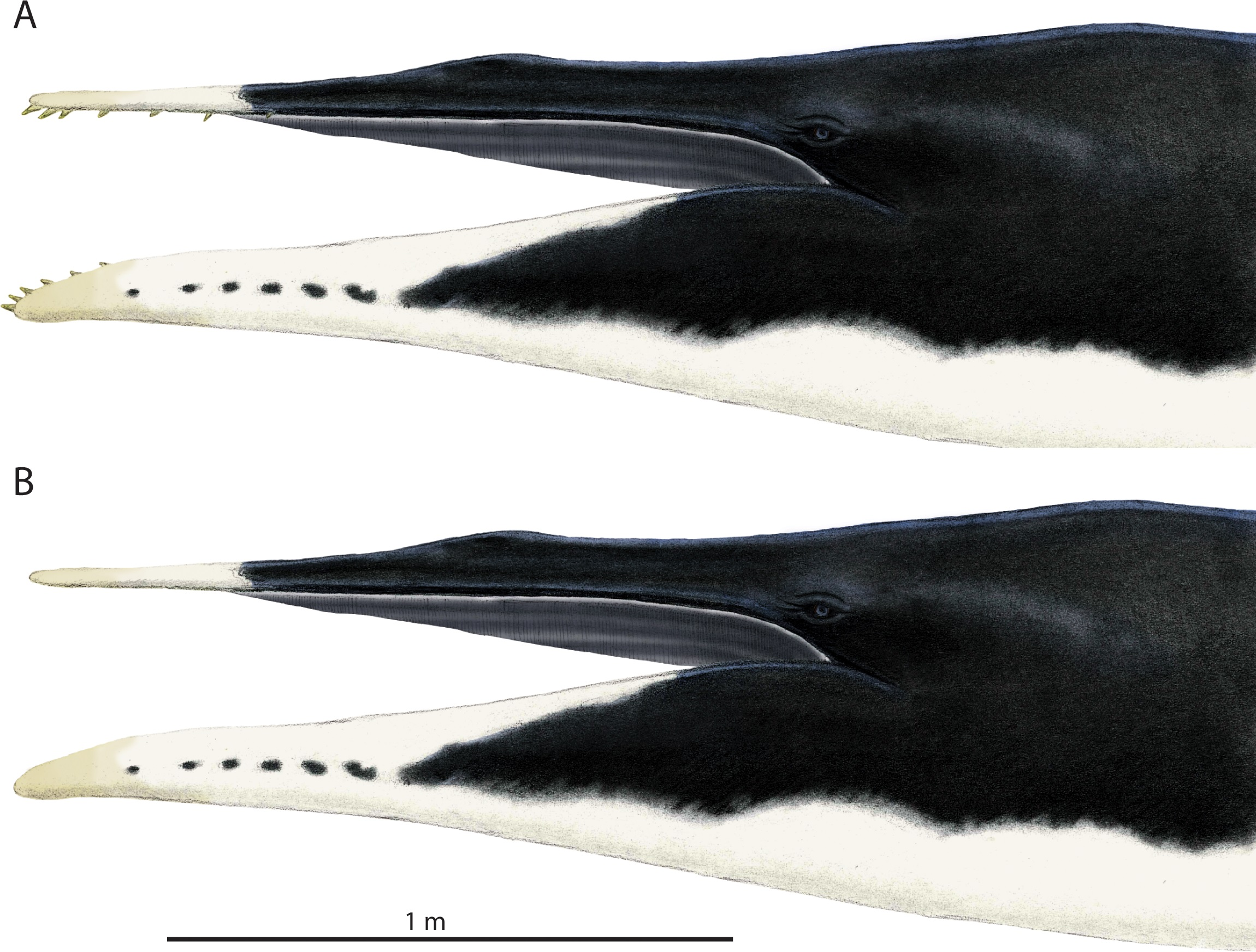 Alternative life restorations of Waharoa ruwhenua. (A) with erupted permanent dentition; (B) without dentition.